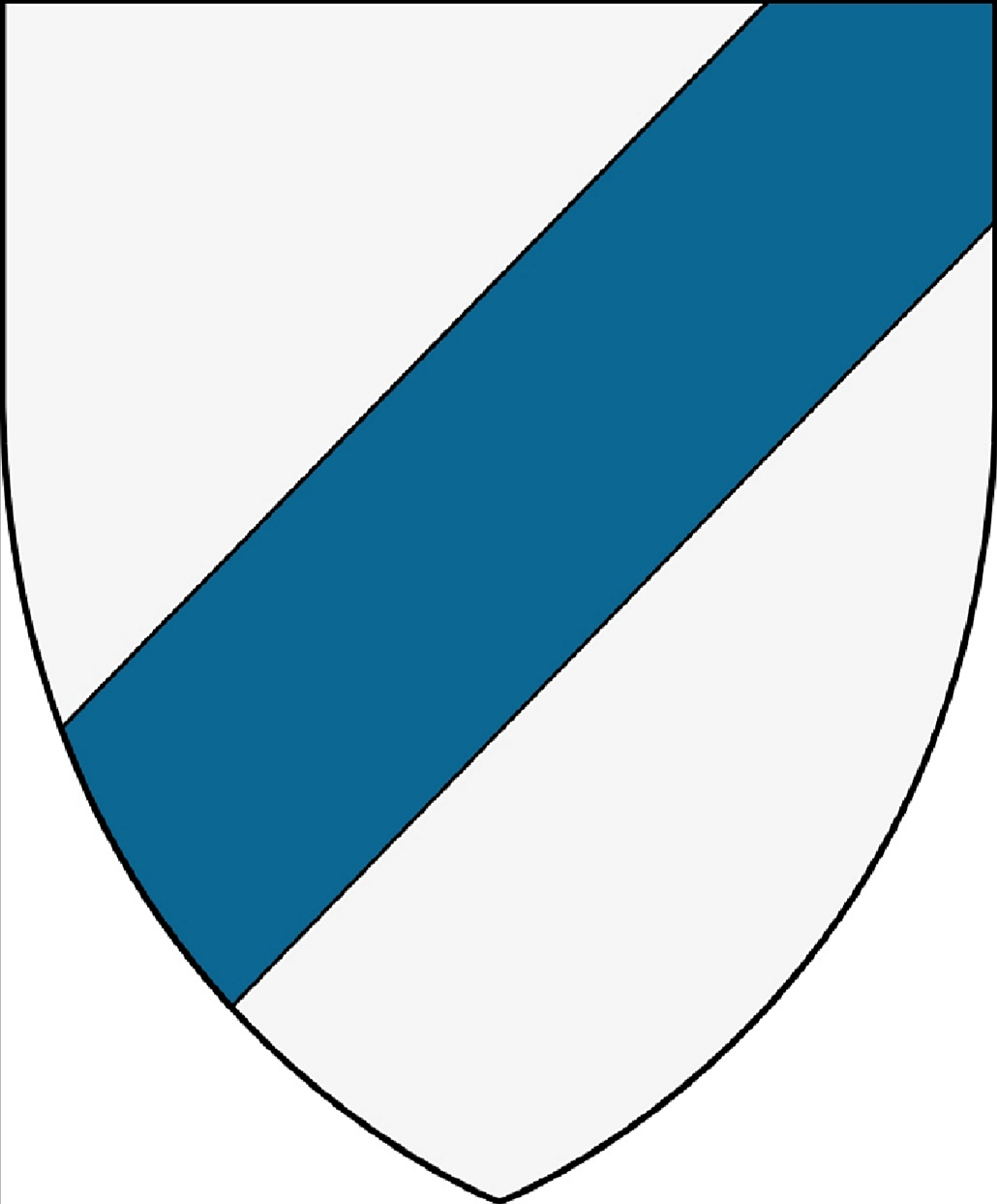 Stammwappen der Herren von Graben (Krain, Steiermark 12. bis 15. Jahrhundert; die niederösterreichischen Grabner aber den Schrägrechtsbalken bis in das 17. Jahrhundert). Stammwappen laut: Adalbert Sikora: "Die Herren vom Graben", in Zeitschrift des historischen Vereines für Steiermark. 51. Jahrgang, Graz 1960